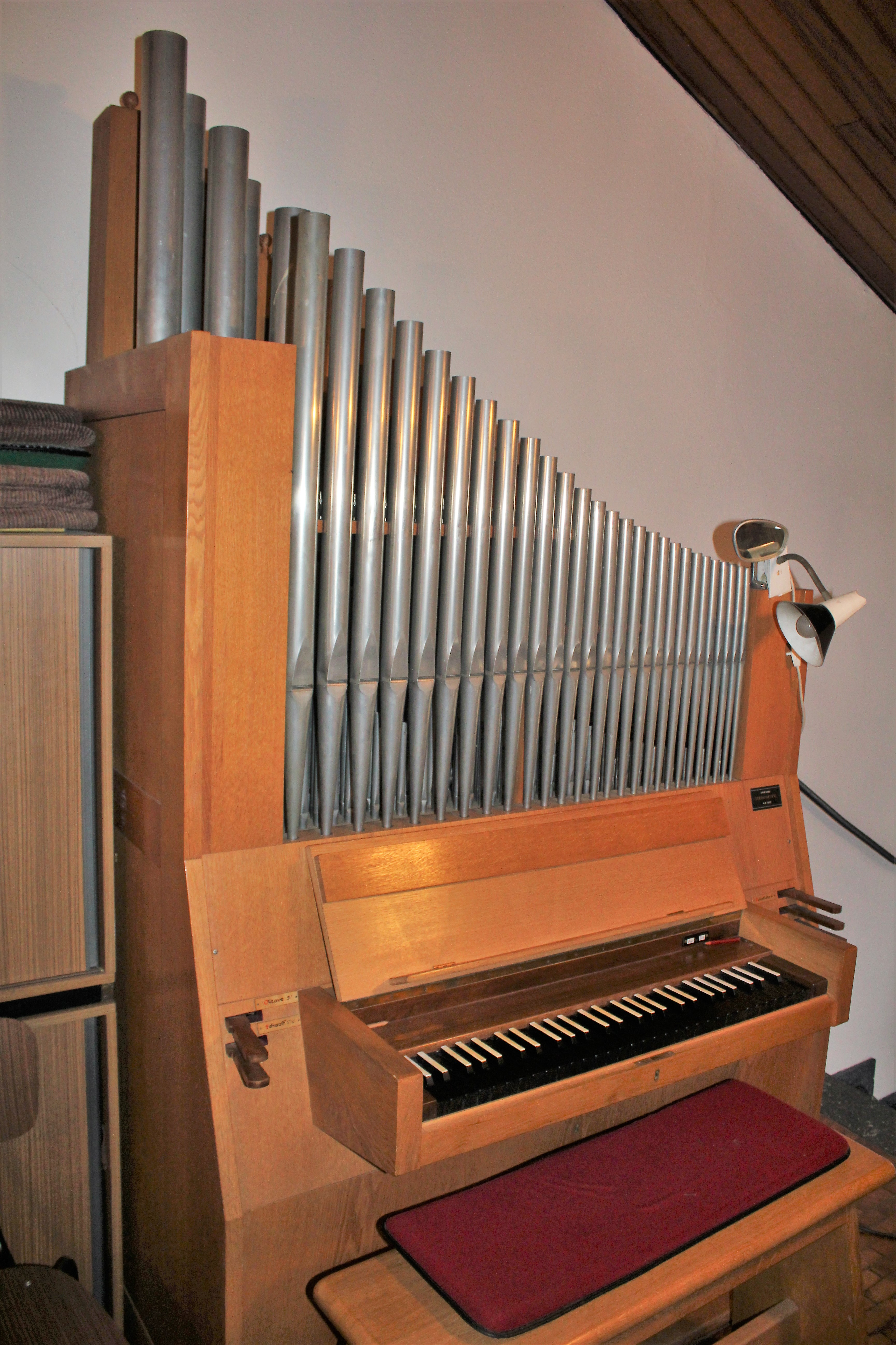 Orgel der Ev. Kirche Espa, Langgöns, Landkreis Gießen, Hessen, Deutschland